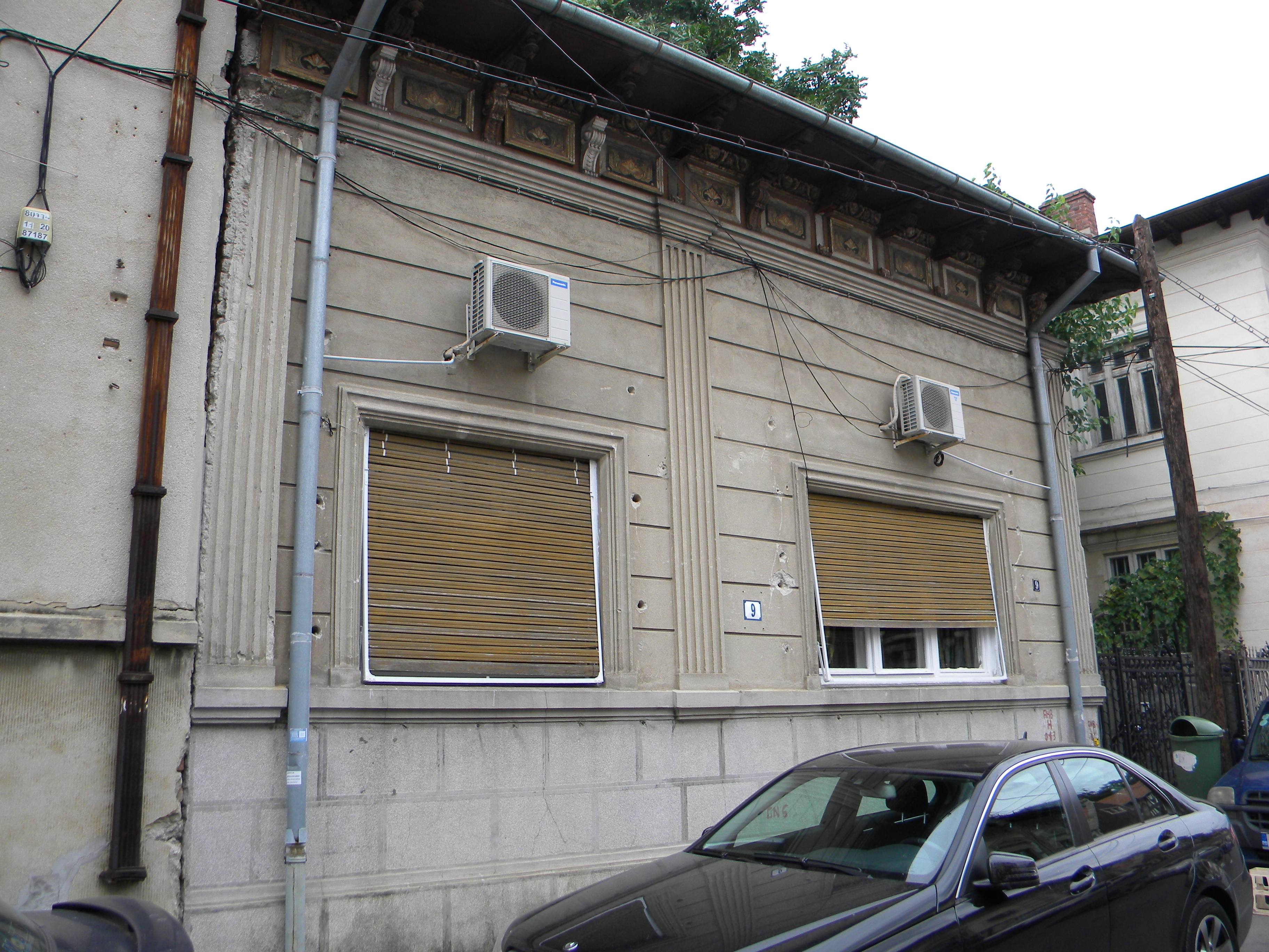 Bucuresti, Romania, Casa pe Str. Vasile Alecsandri nr. 9; B-II-m-B-17944